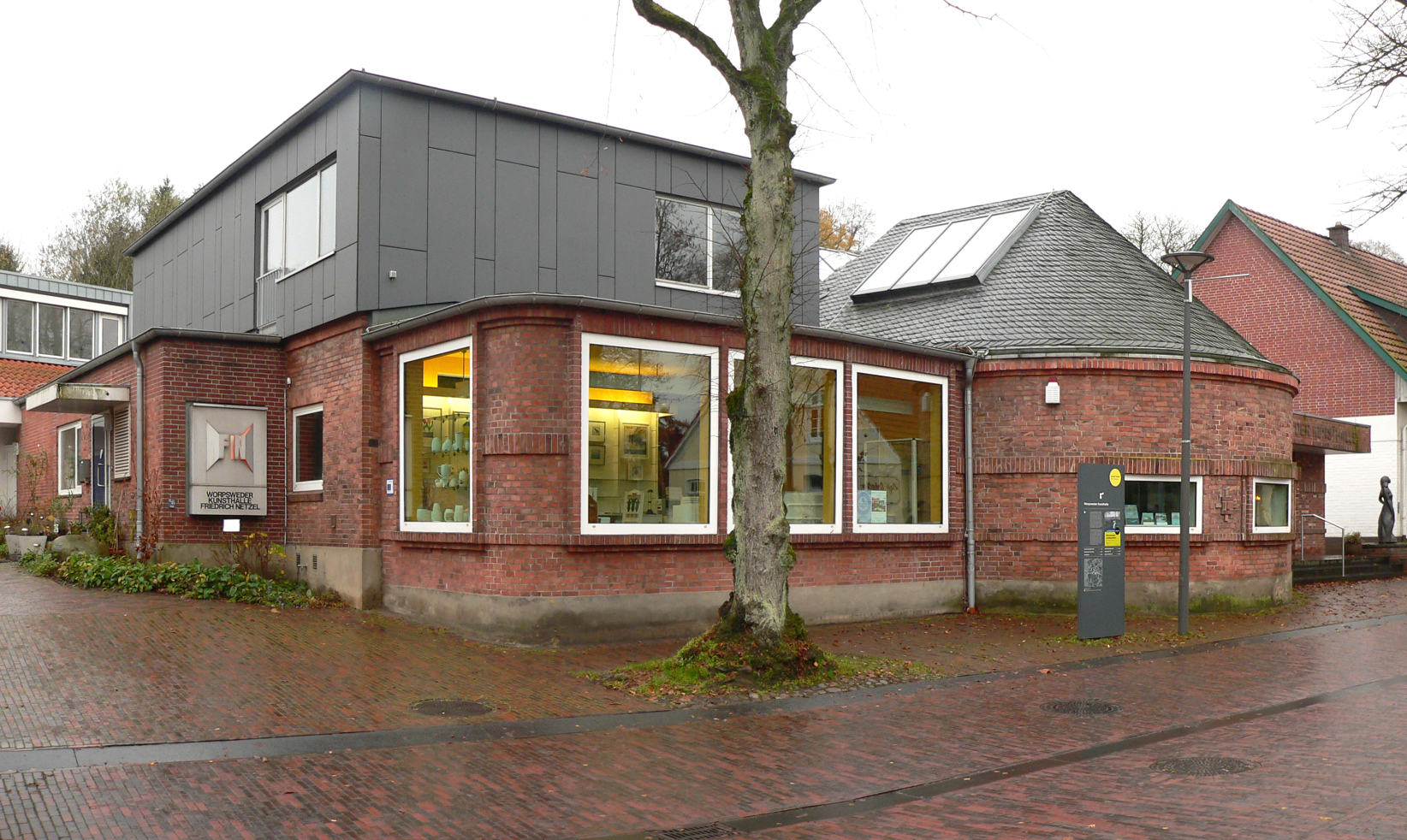 Worpsweder Kunsthalle FriedrichNetzel